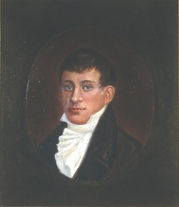 Portrett av Christopher Frimann Omsen